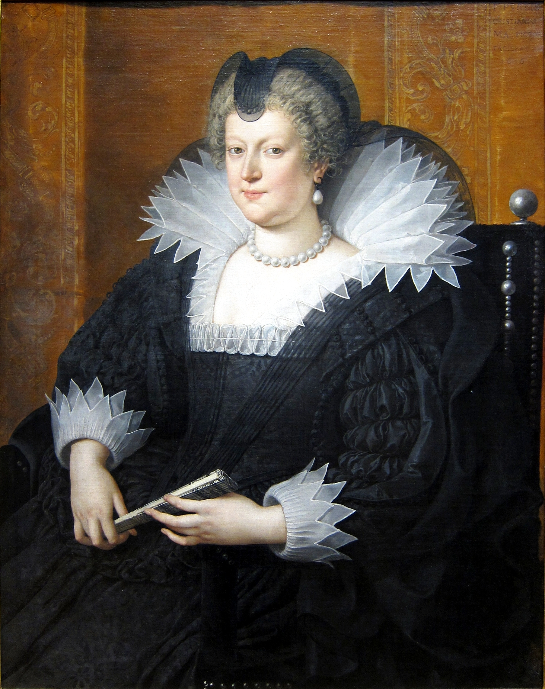 Marie de Medicis